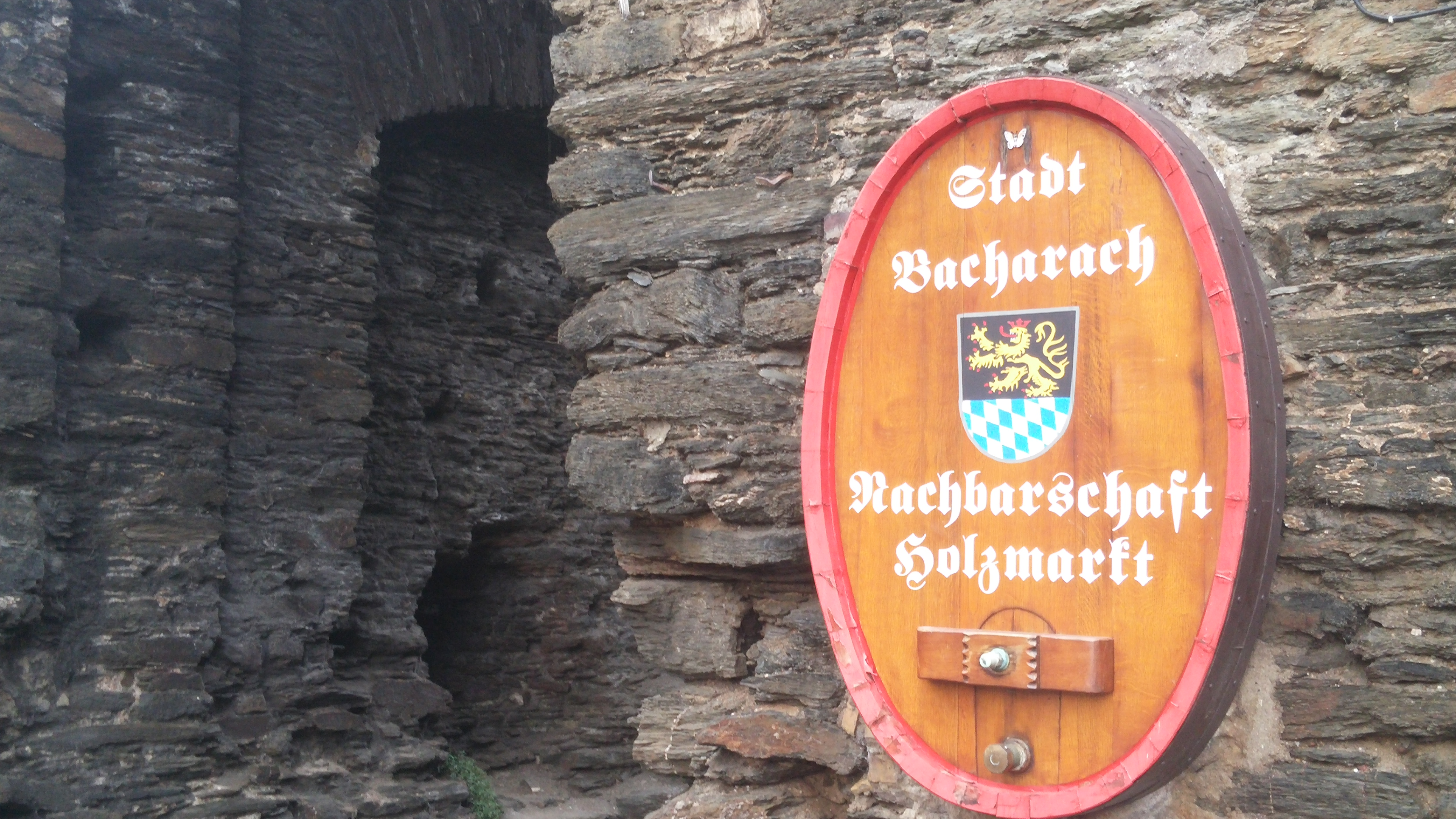 אחד משערי העיירה בכרך